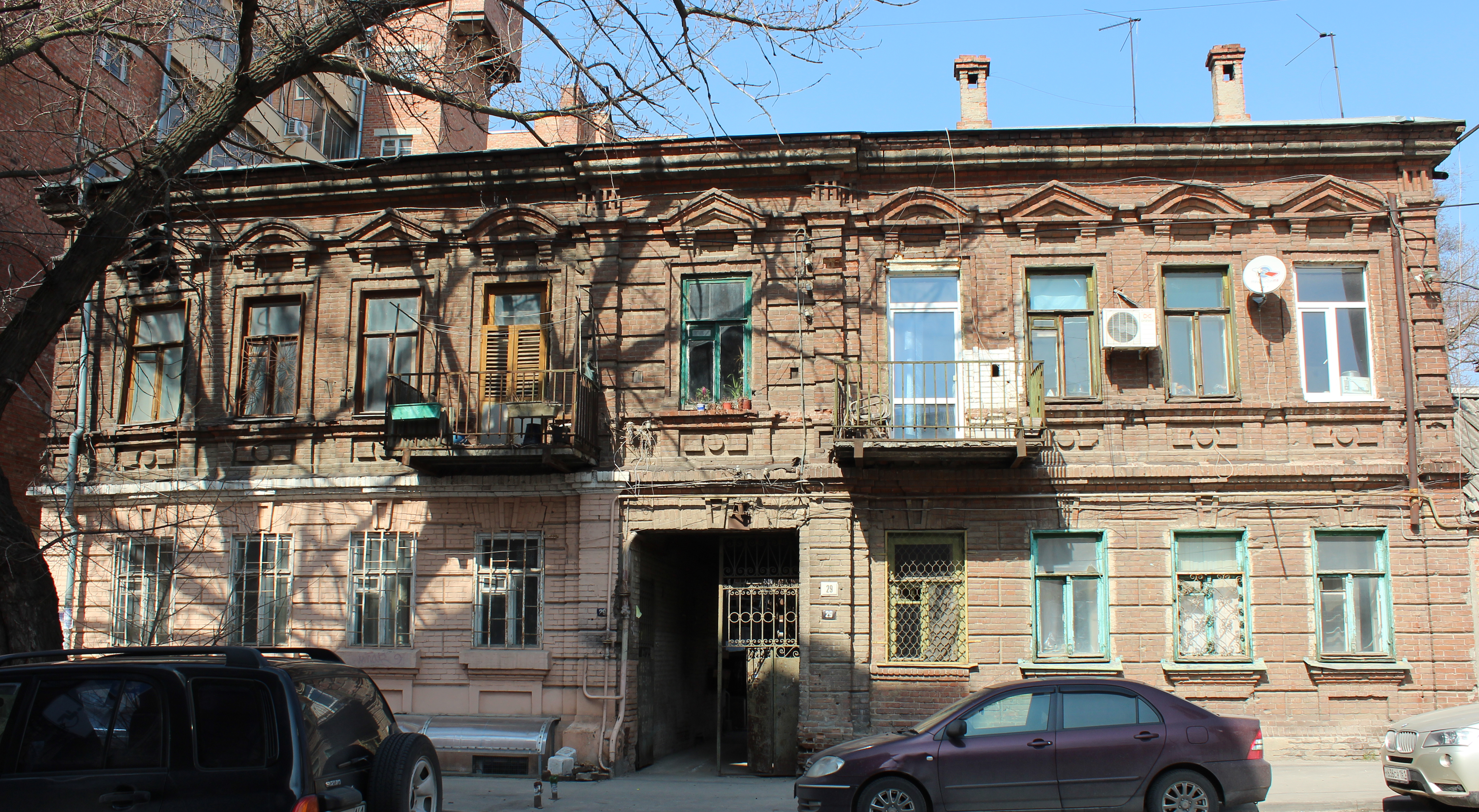 Здание города Ростова-на-Дону